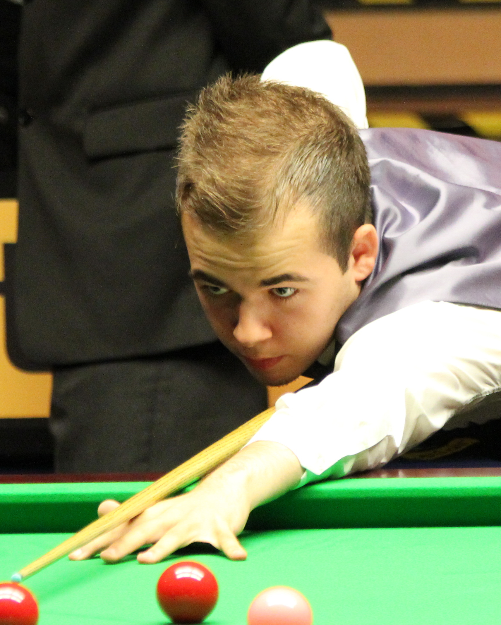 Luca Brecel beim Paul Hunter Classic 2012